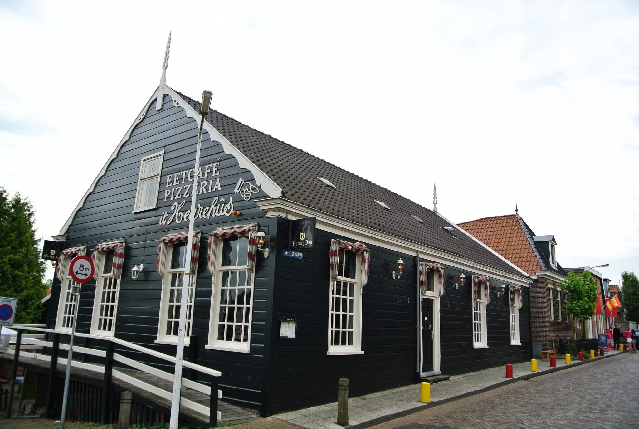 8715 Stavoren, Netherlands